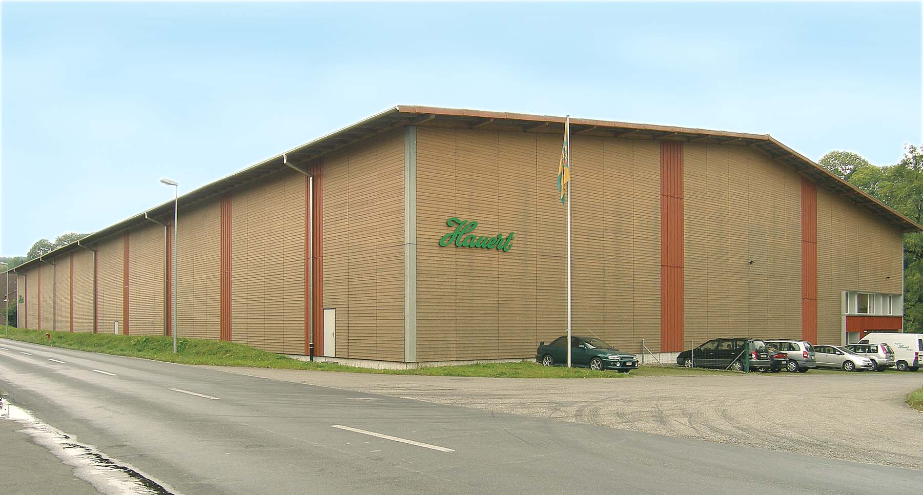 Speditionsgebäude um 2008